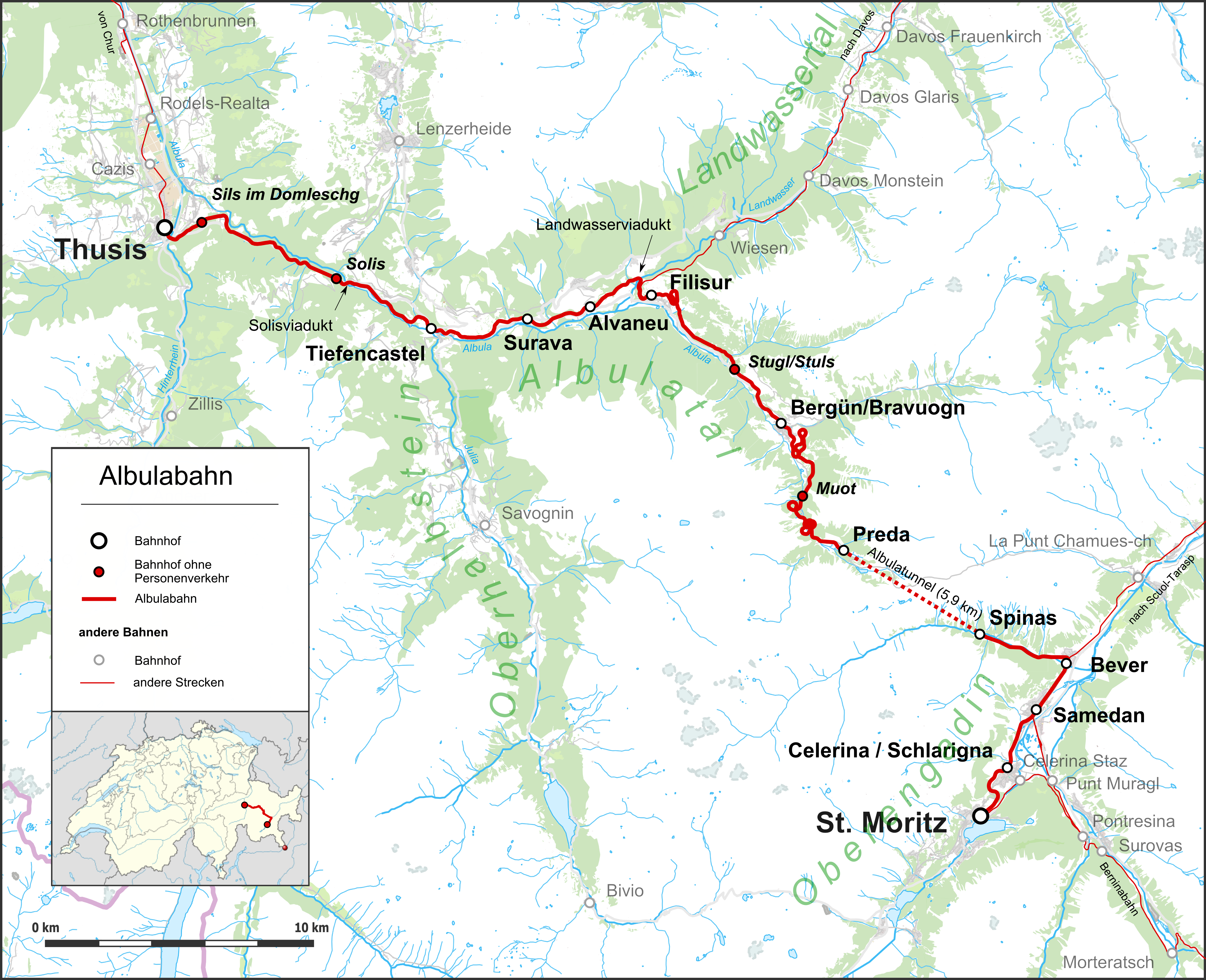 Karte der Albulabahn in der Schweiz